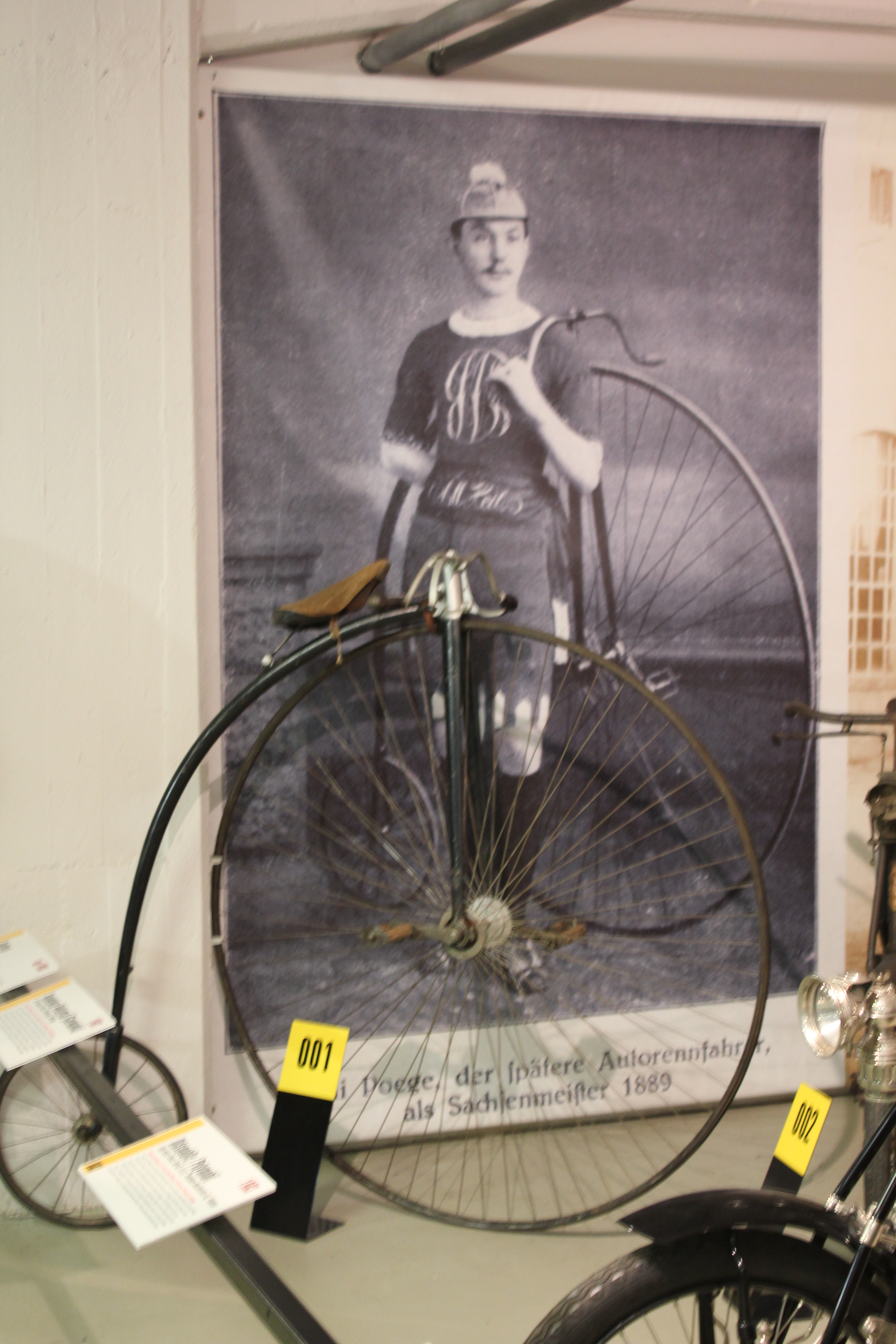 Willi Pöge als Sachsenmeister 1889 mit Wanderer Hochrad. Exponat Museum für Sächsische Fahrzeuge